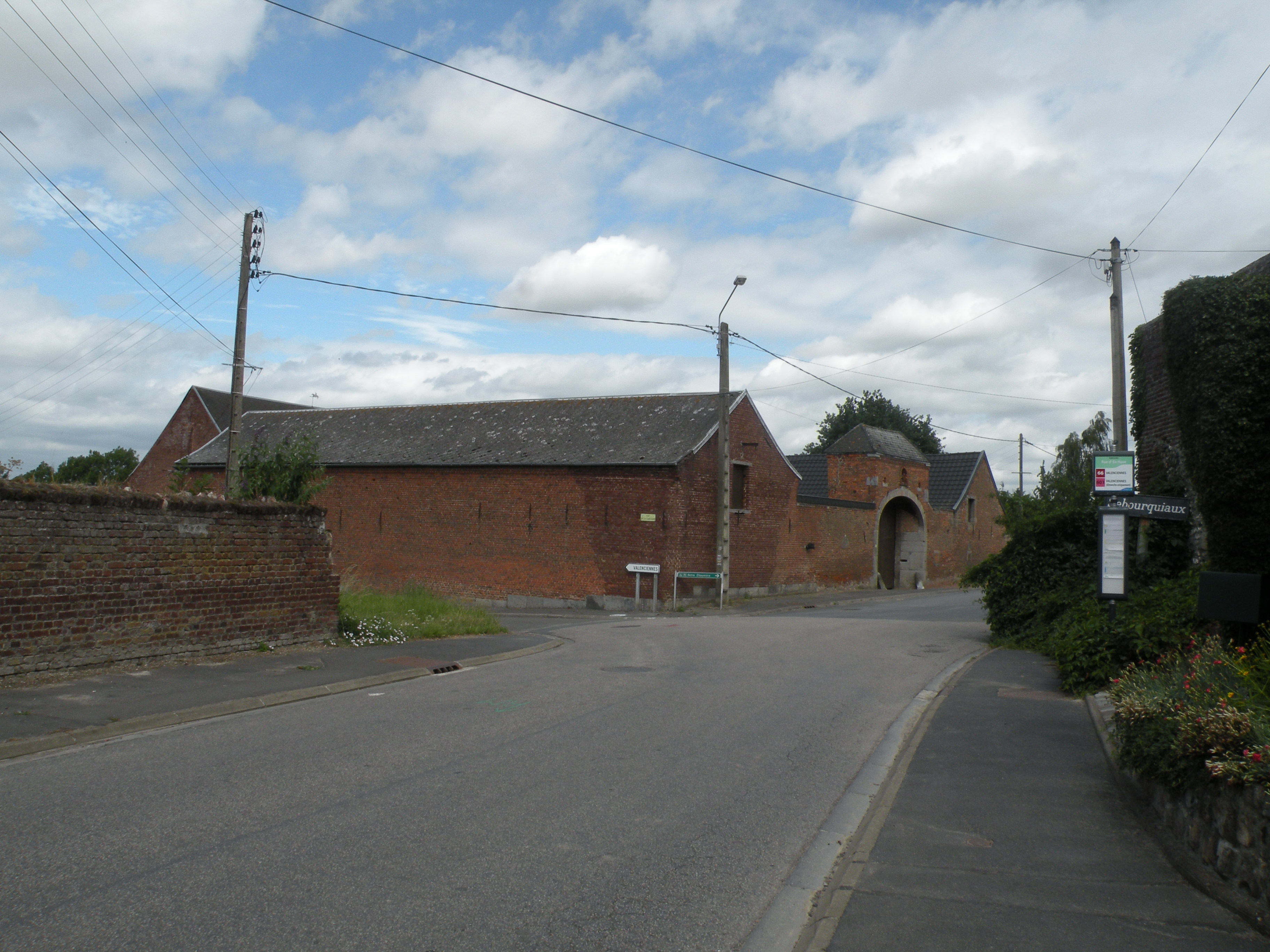 entree de Sebourquiaux, Sebourg